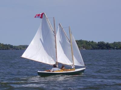 Schooner Shrike reaching near Kingston, ON in September, 2005.